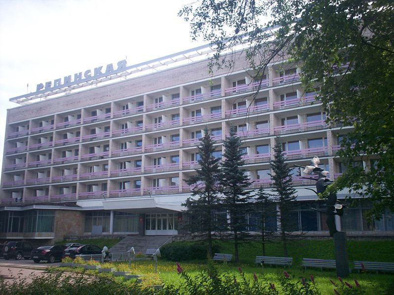 Гостиница Репинская в Репино (2007)